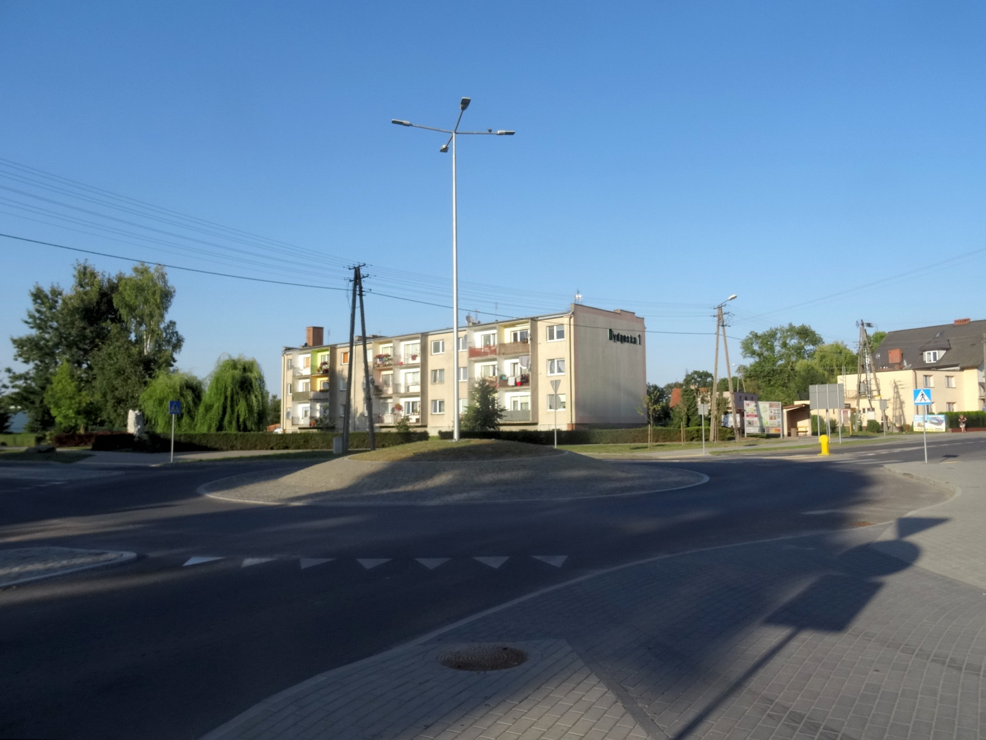 Sicienko - wieś gminna w powiecie bydgoskim, woj. kujawsko-pomorskie